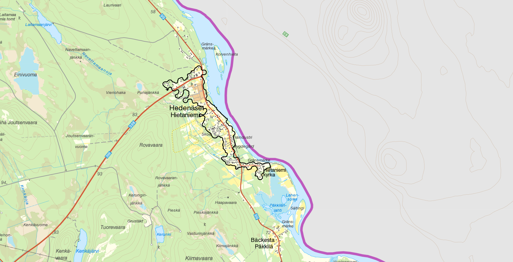 Tätorten Hedenäset med gränserna från Statistiska centralbyråns tätortsavgränsning 2015. Bakgrundskarta från Lantmäteriet, skala 1:30 236.